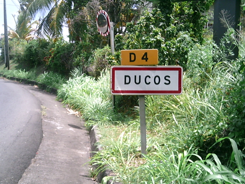 Français cadien: ducos martinique caraibes